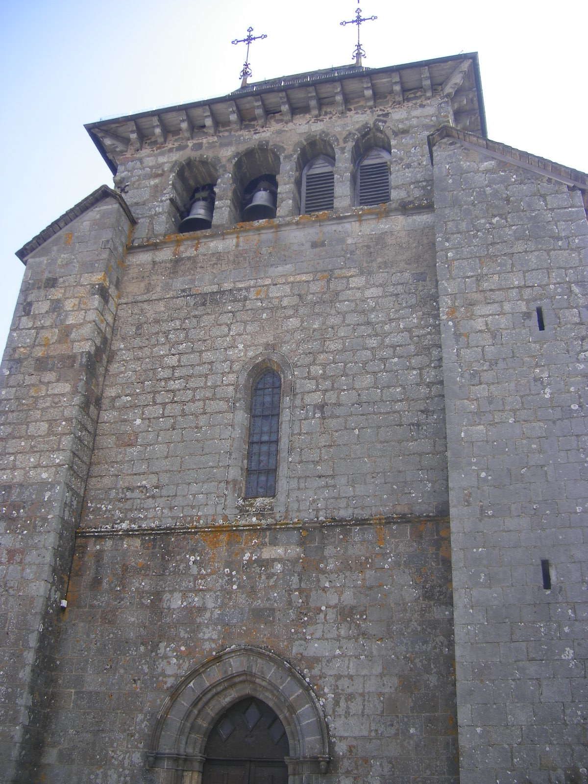 Sansac-de-Marmiesse